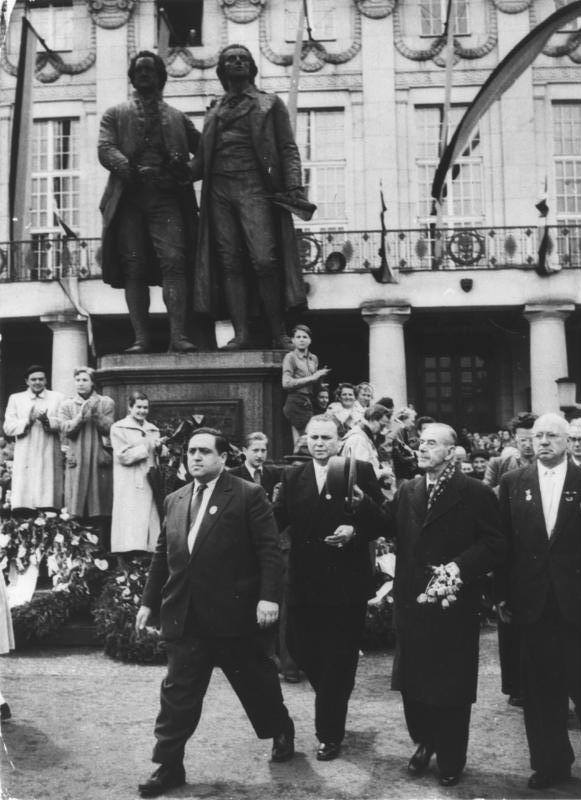 Thomas Mann in Weimar Zentralbild/TBD 15.5.1955 Schiller-Ehrung vom 8.-15. Mai 1955 in Weimar 14. Mai 1955 Beim Festakt im Deutschen Nationaltheater in Weimar hielt Thomas Mann die Festansprache. Der Dichter wurde Ehrenmitglied der Akademie der Künste. Minister Dr. h.c. Johannes R. Becher überreichte Thomas Mann die Ehrenurkunde. UBz.: Thomas Mann nach dem Festakt beim Verlassen des Deutschen Nationaltheaters in Weimar. (rechts) Minister Dr. h.c. Johannes R. Becher [Weimar.- Thomas Mann und Johannes R. Becher am Goethe-Schiller Denkmal] Abgebildete Personen: Mann, Thomas Prof. Dr.: Schriftsteller, Nobelpreis für Literatur 1929, Goethe-Preis 1949, Deutschland (GND 118577166) Becher, Johannes R.: Kulturminister, Dichter, Schriftsteller, DDR